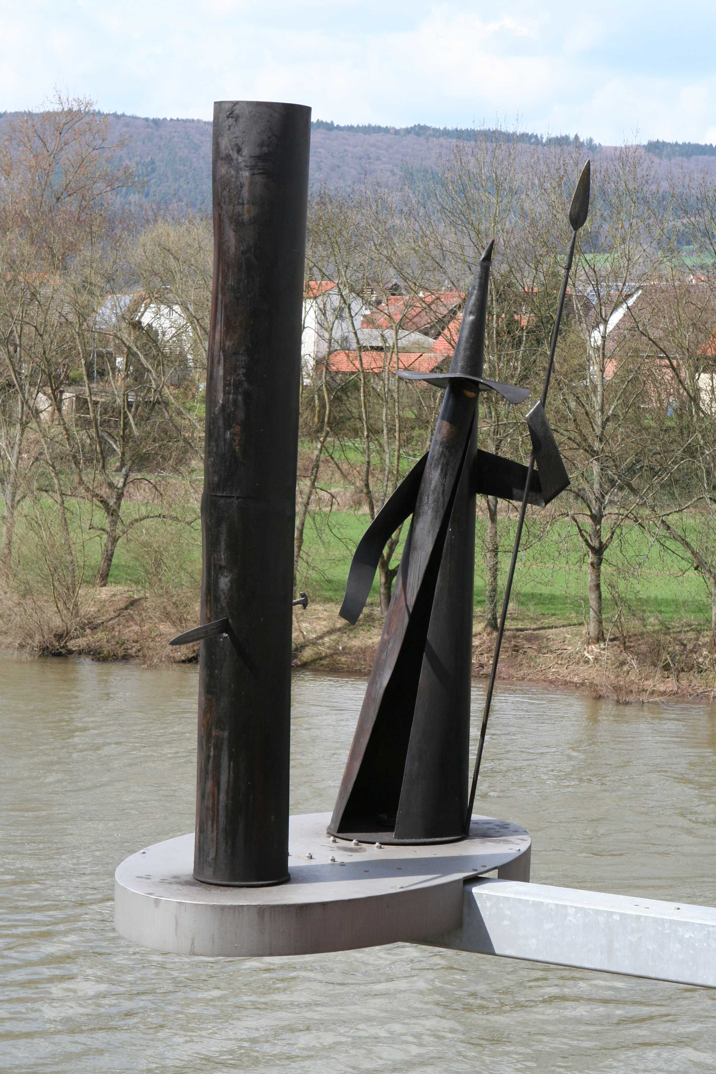 Mainbrücke Freudenberg, Skulptur Wodan und das Schwert im Baum